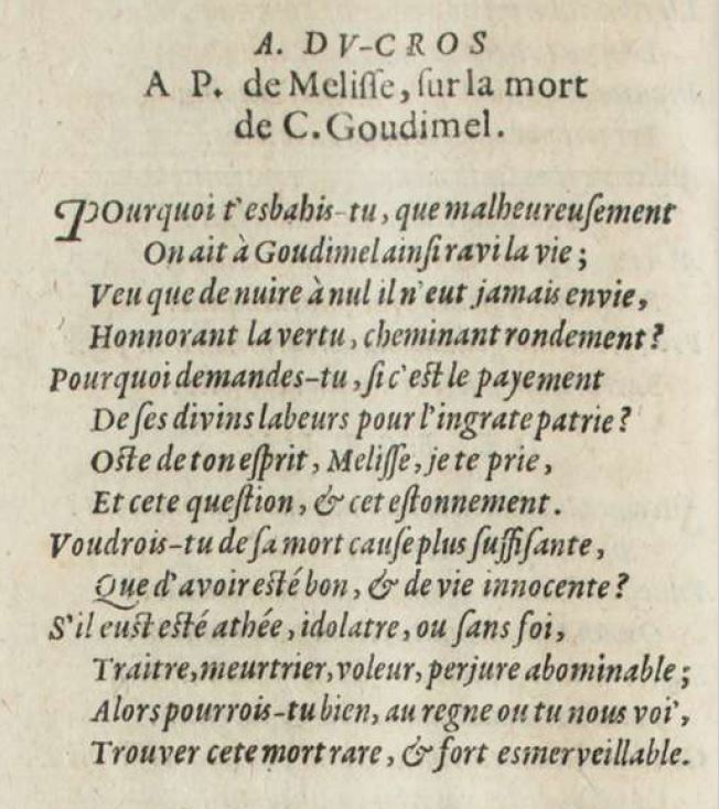 Pièce en l'honneur de Goudimel, par A. Du Cros (extrait des Reliquiae de Schede, Frankfurt, 1575).